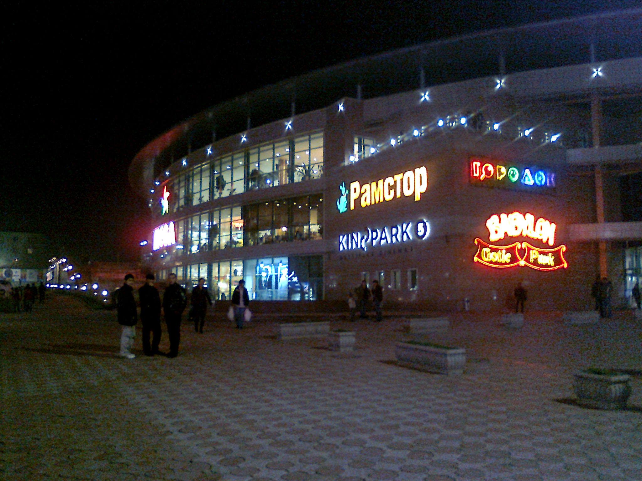 Торгово-развлекательный комплекс "Mega Center Shymkent". Перекресток пр.Тауке-хана - бул. Кунаева. Напротив ЦУМа.